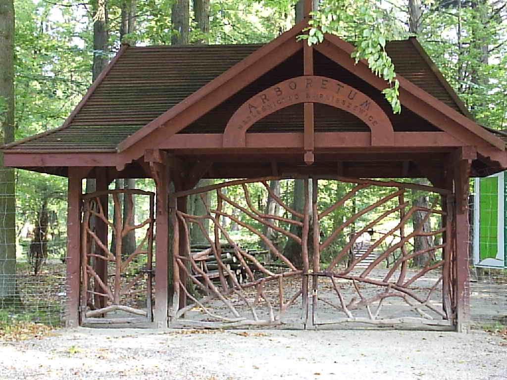 Arboretum w Karnieszewicach - brama wejściowa.